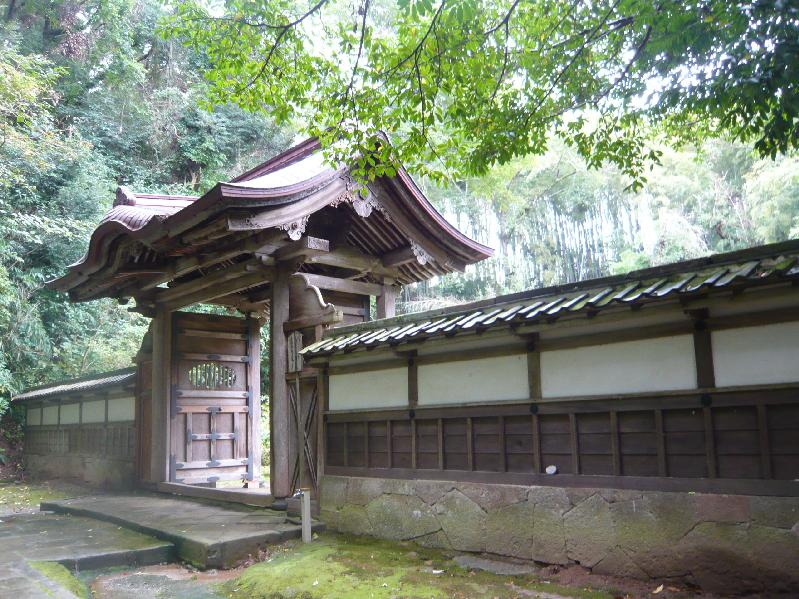 Gesshouji Temple in Matsue City - 松江市の月照寺